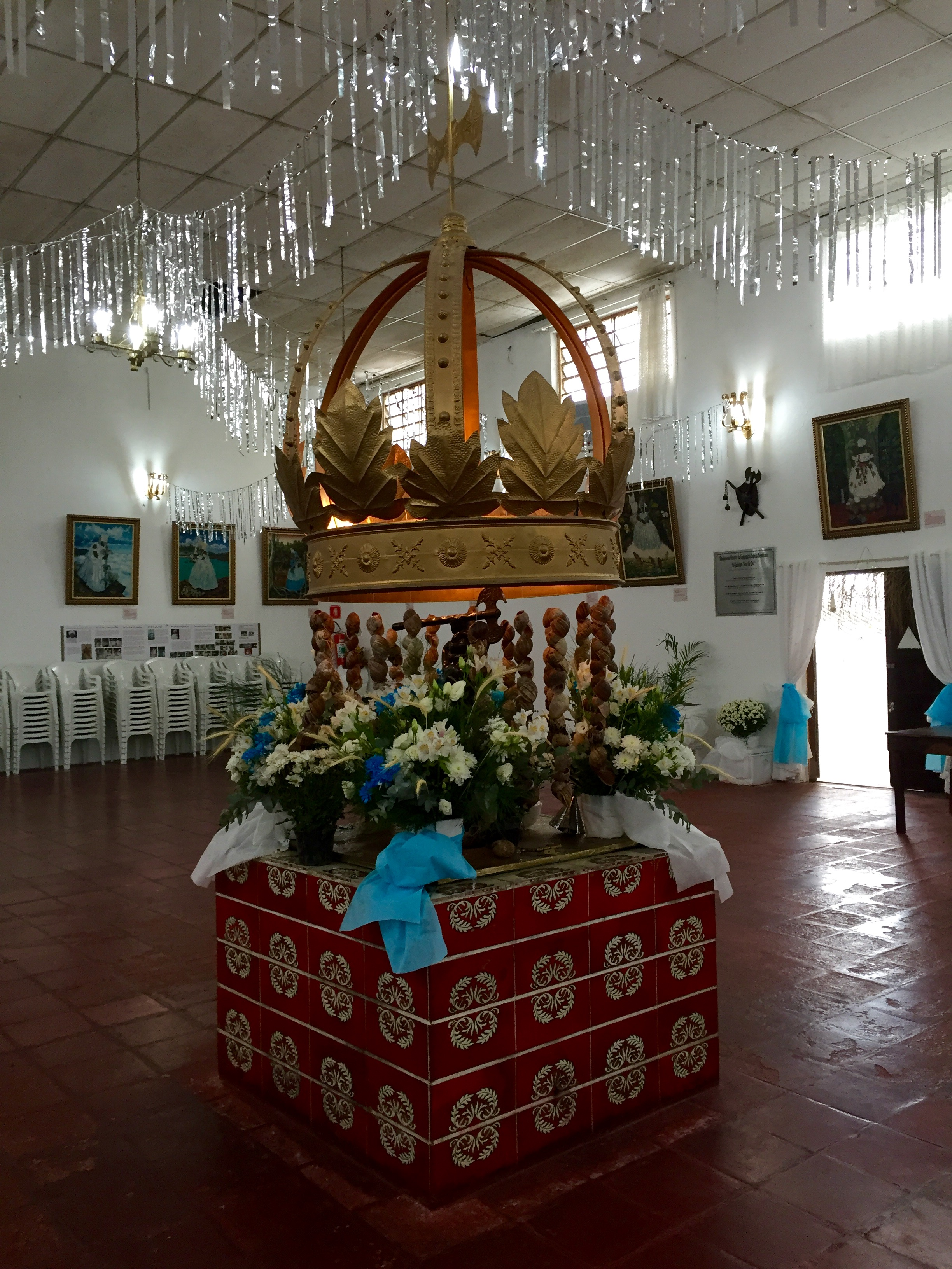 Coroa do salão, onde simbolicamente se concentram os fundamentos do Axé Ilê Obá, em São Paulo (SP), Brasil.